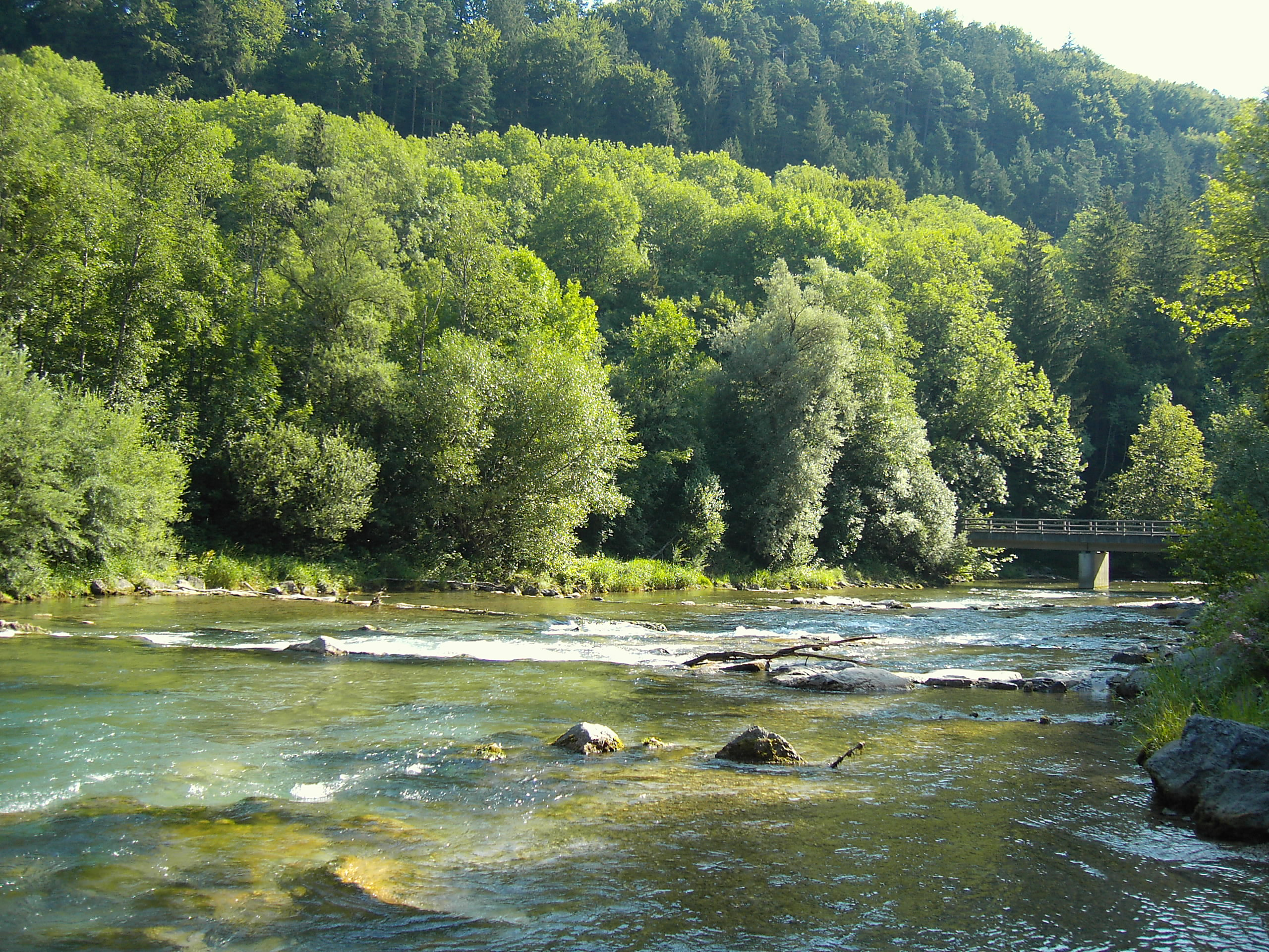 Mangfallknie (flussabwärts gesehen)